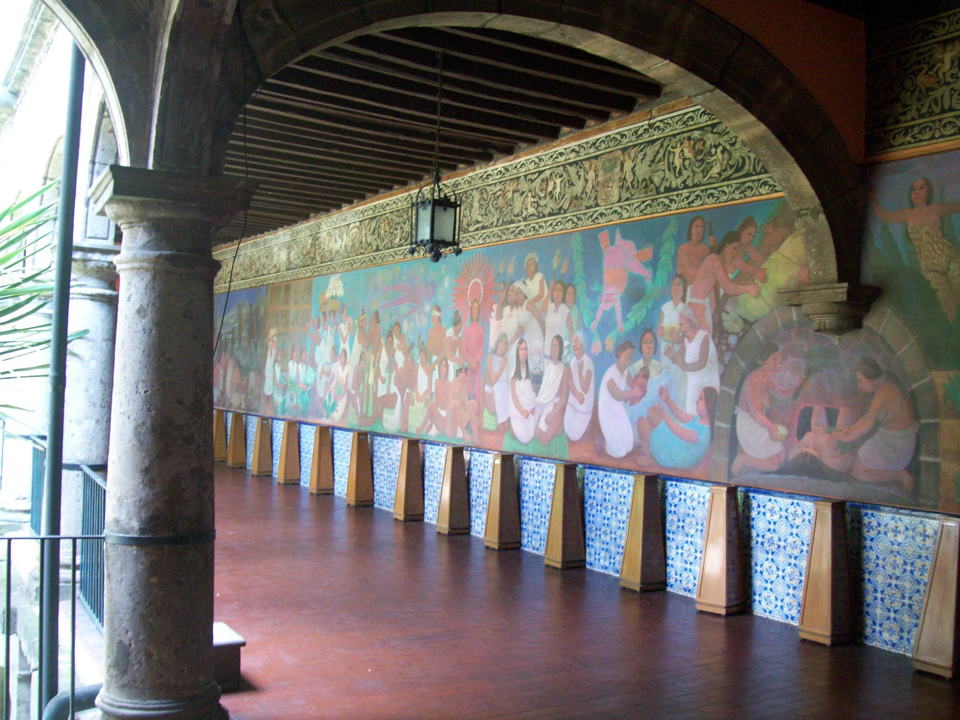 Hospital de Jésus